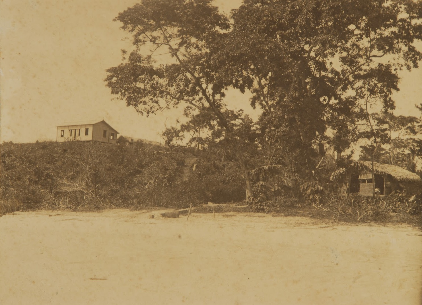 Área do atual Porto do Itaqui em fotografia de 1908. Seu autor morreu em 1920